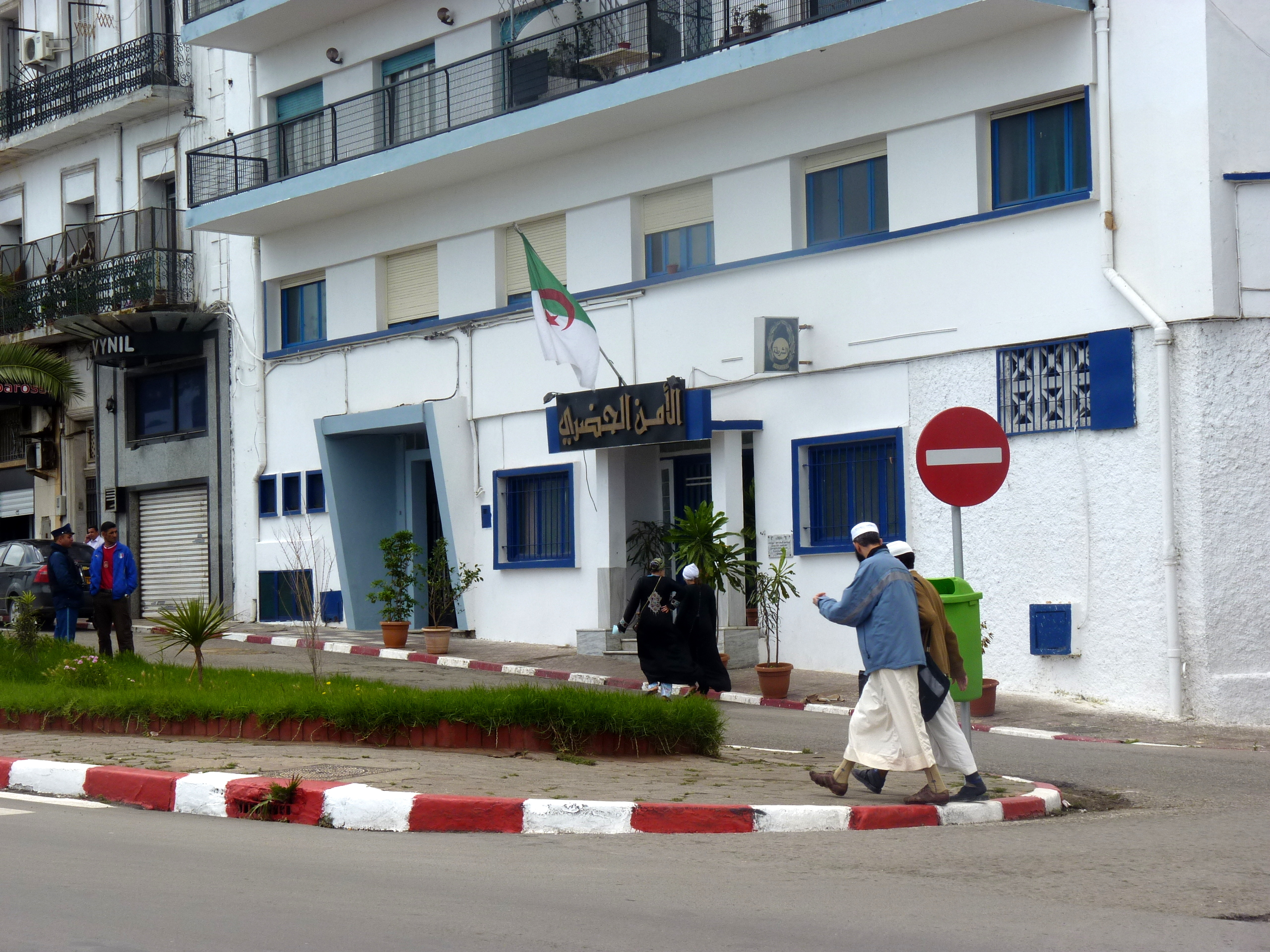 Algérie Mai 2011